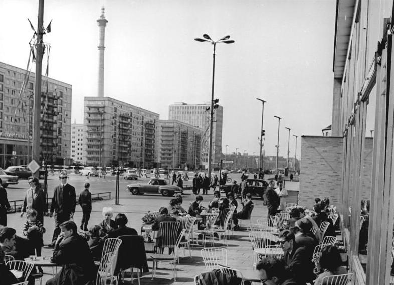 Berlin, Karl-Marx-Allee, Milchbar, Terrasse Zentralbild Franke 15.4.1967 Frühjahrsstimmung in der Berliner Karl-Marx-Allee. Die wärmenden Strahlen der Frühjahrssonne verlockten zahlreiche Berliner zu einem Aufenthalt an der Milchbar in der Karl-Marx-Allee.